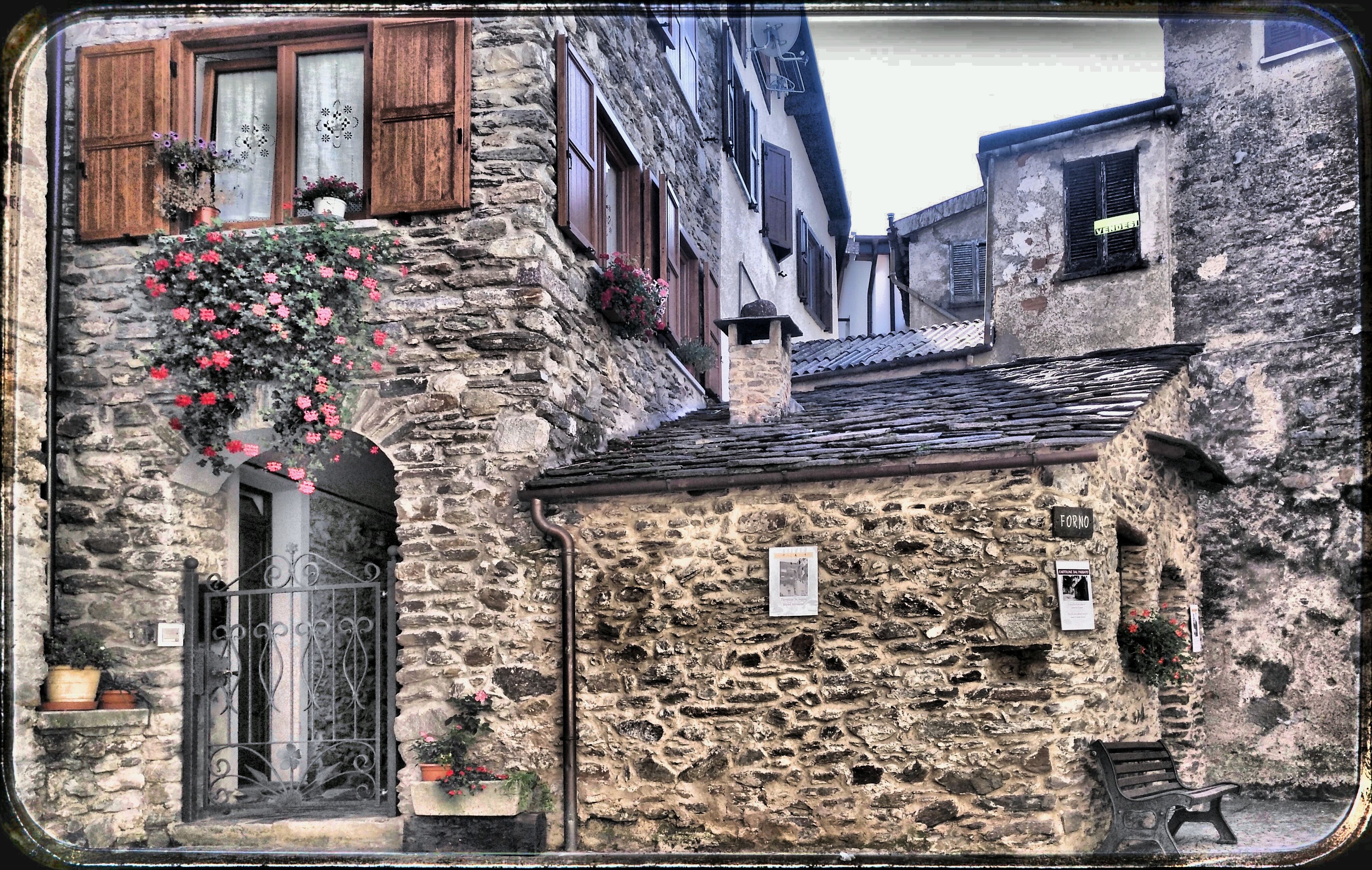 Piazzetta